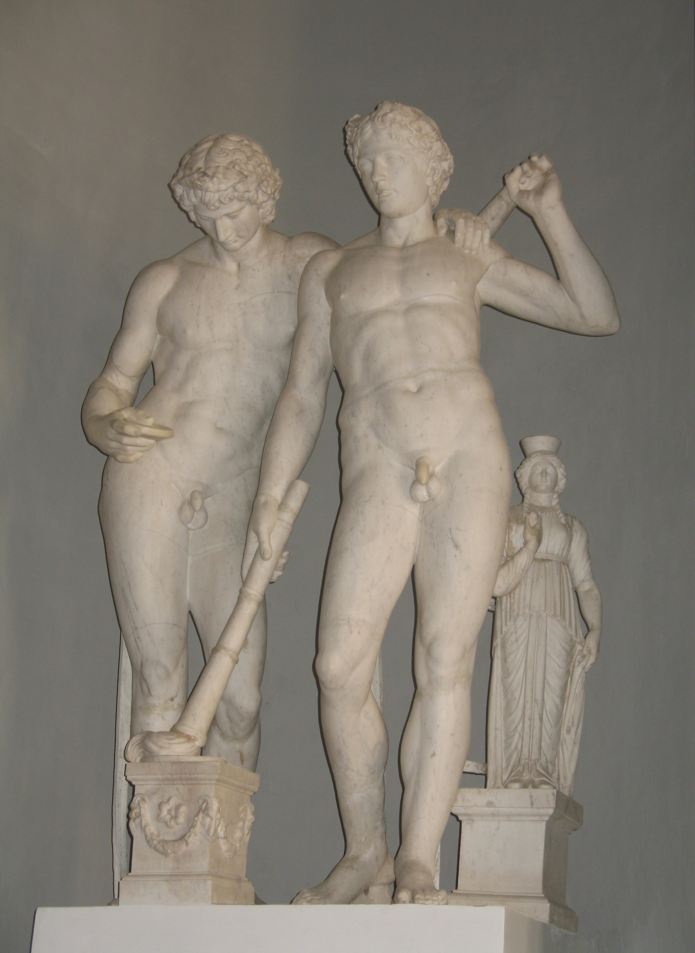 Статуя из имения Архангельское